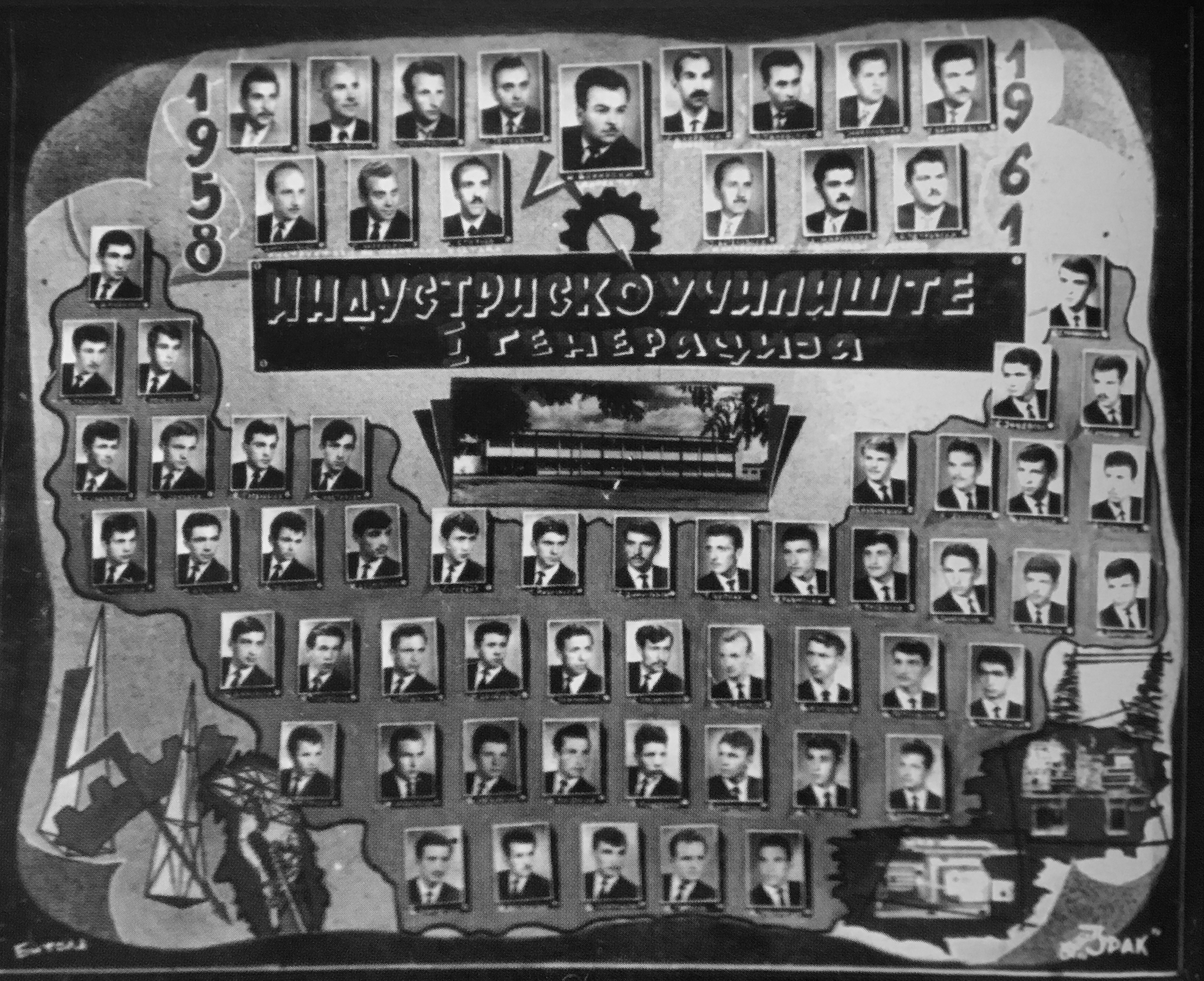 Прв наставен кадар и генерација ученици од 1958 до 1961